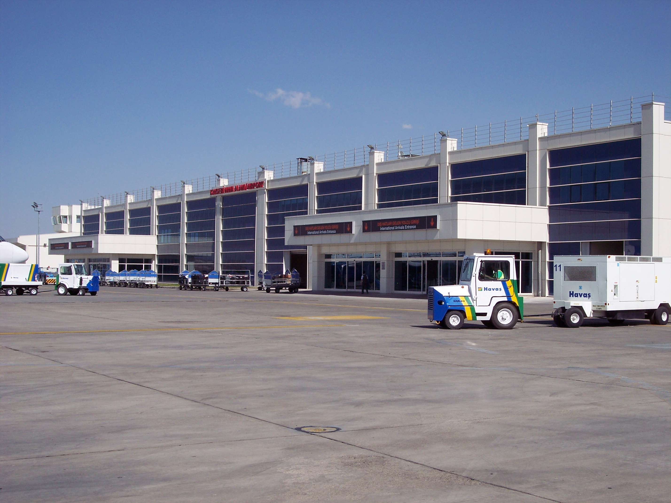 Kayseri Havalaani Airport